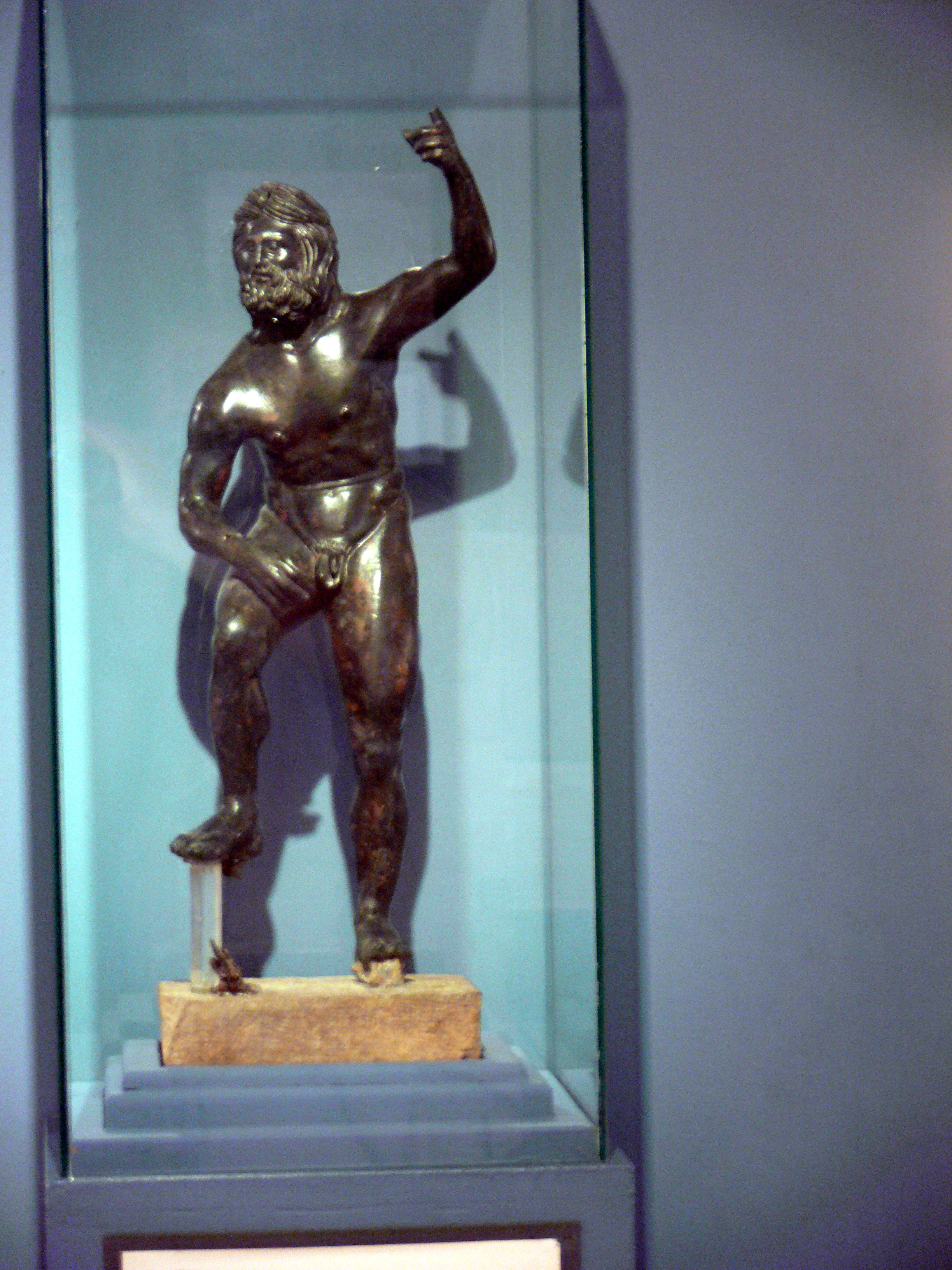 Poseidon. Pella Museum